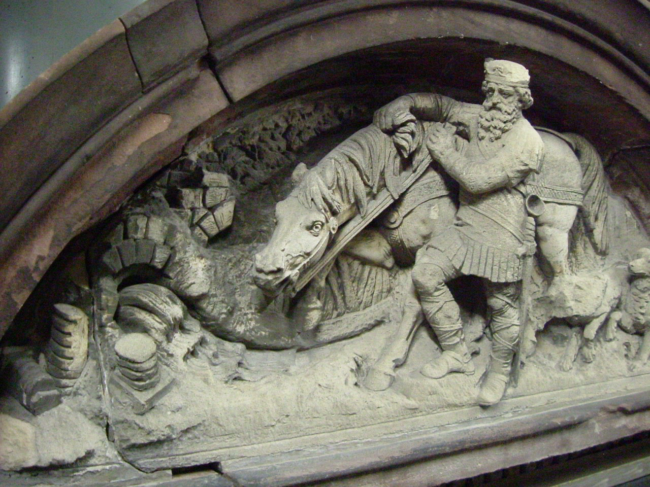 Kaiser Karls Pferd entdeckt bei einem Jagdausritt die heißen Quellen von Aachen - Reliefstein, ehemals über dem Portal des Badehauses "Königin von Ungarn", Aachen